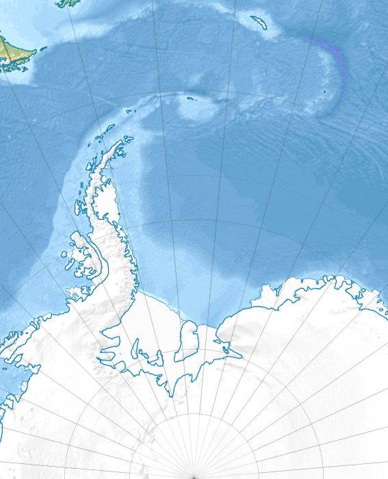 Vedela jūras reģiona karte